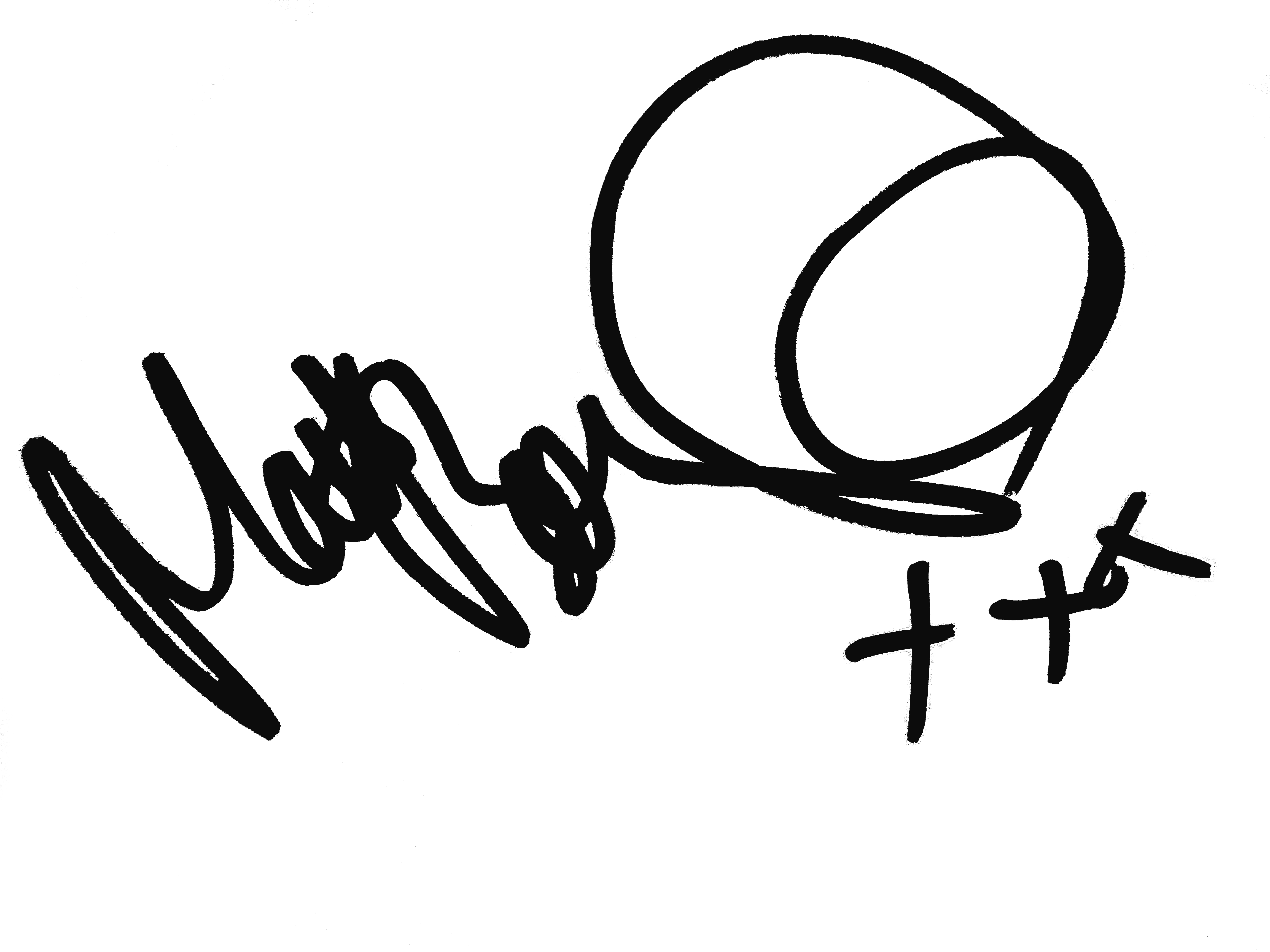 Підпис Метью Белламі